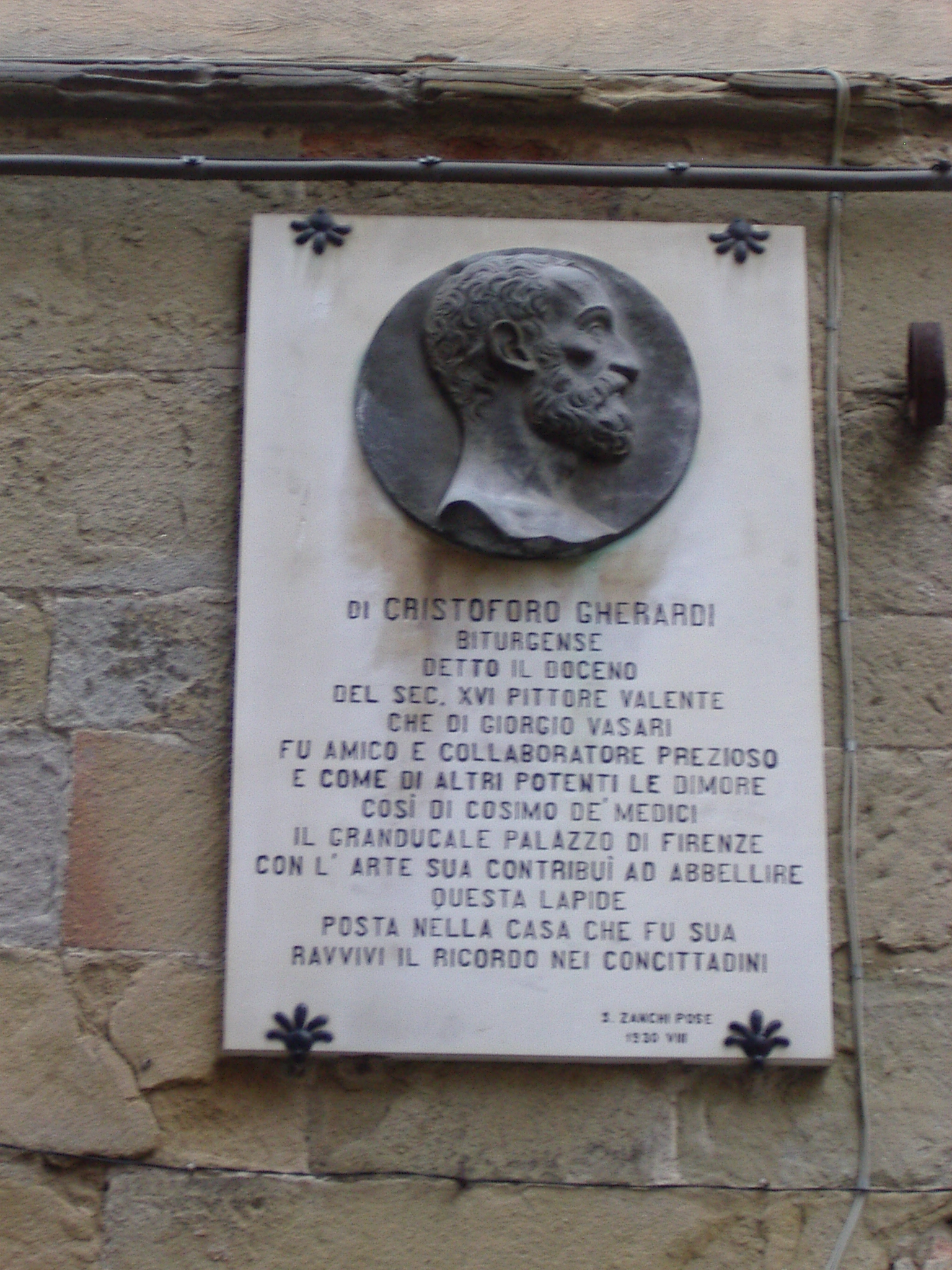 Plaque commémorative dédiée à Cristoforo Gherardi, sur sa maison natale à Sansepolcro, province d'Arezzo, Italie